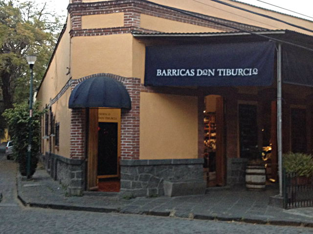 Antigua estación "La Factoria". ( hoy una vinateria).